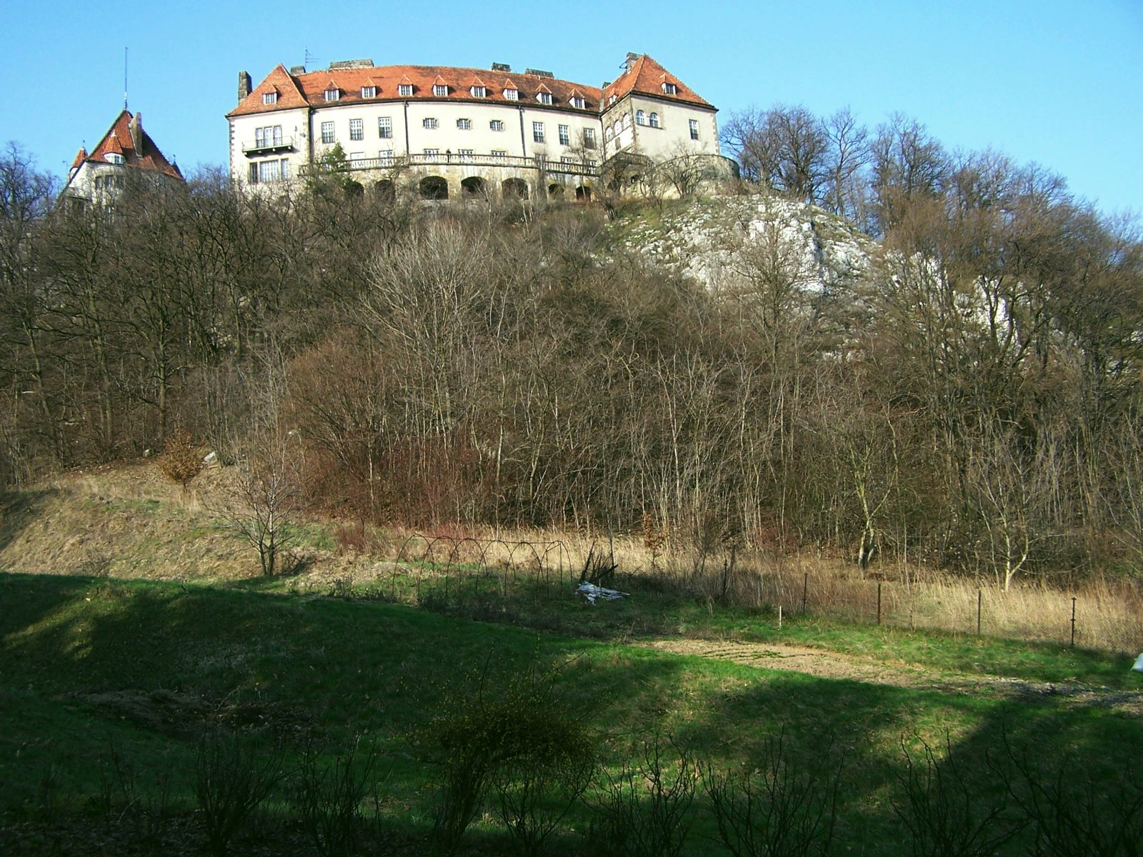 Willa Rotunda w Przegorzałach